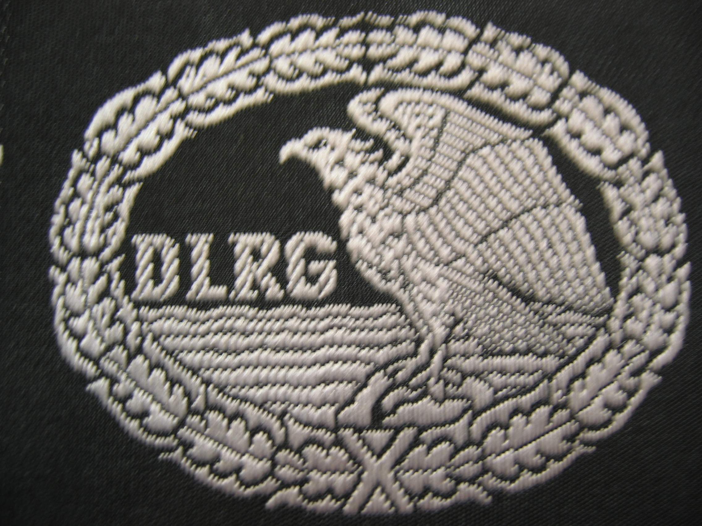 Rettungsschwimmabzeichen Silber